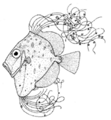 Juvenile Cyttus traversi (King dory)